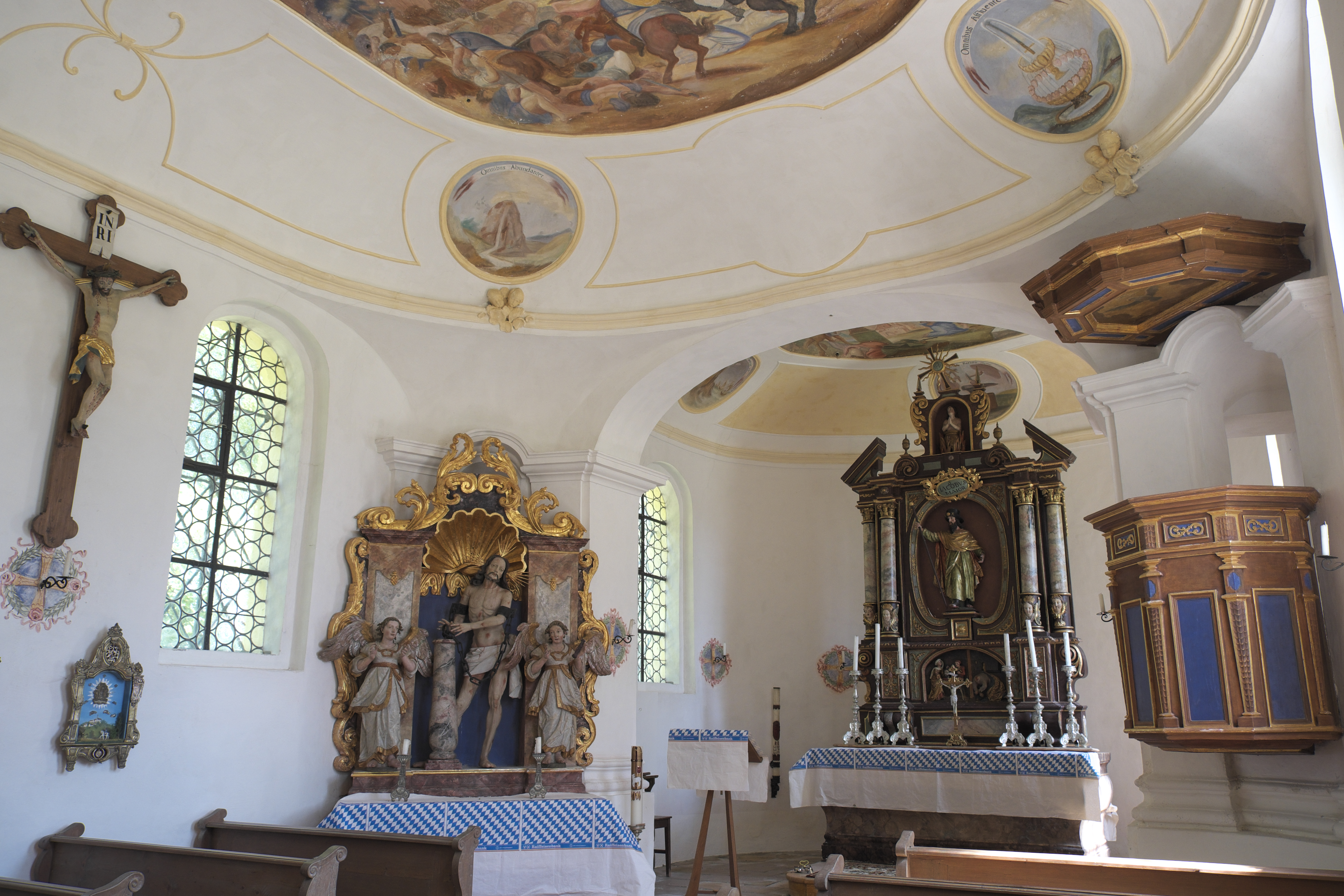 Katholische Kapelle St. Jakobus der Ältere in Seeseiten (Seeshaupt) im Landkreis Weilheim-Schongau (Bayern/Deutschland), Innenraum